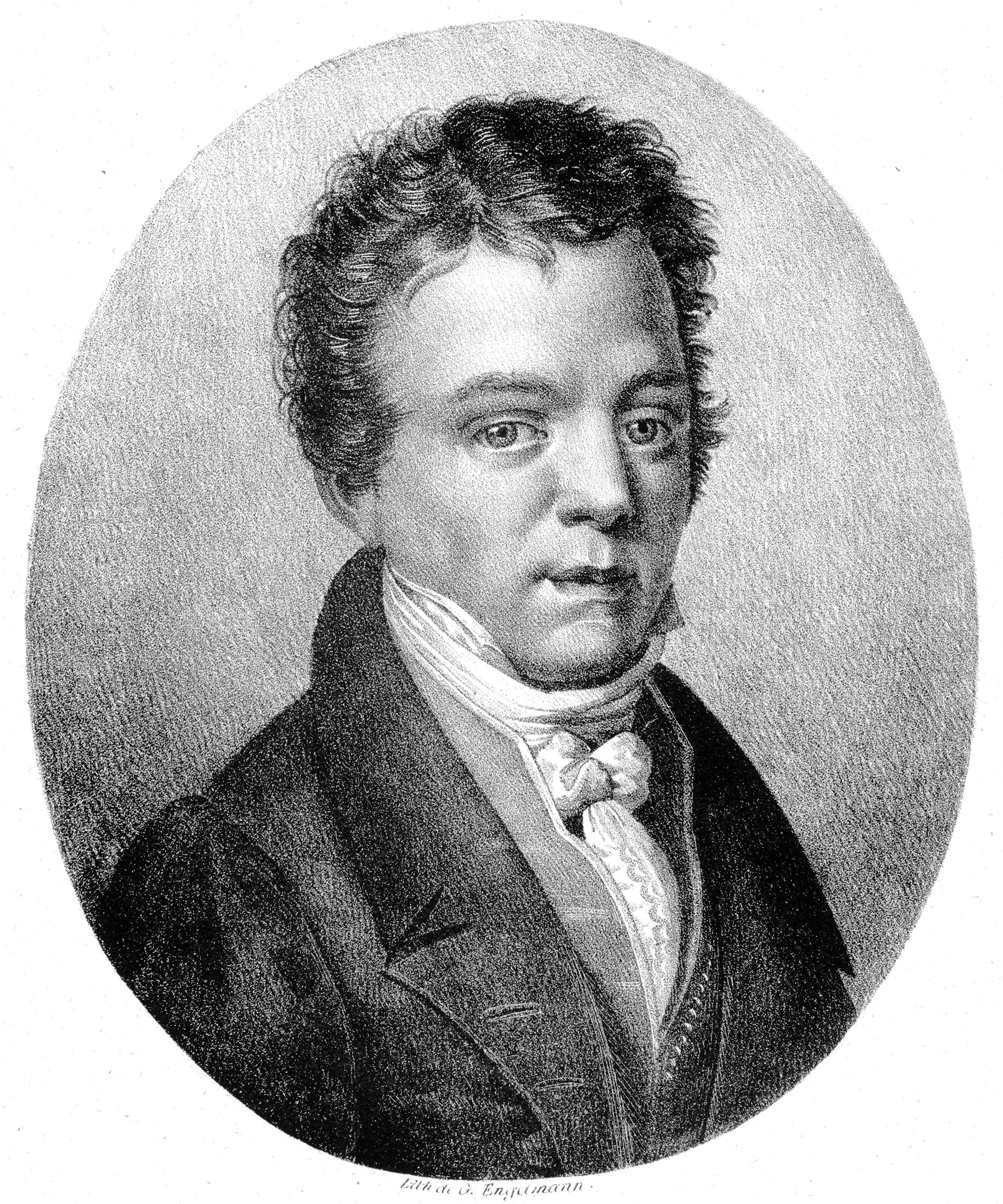 Depicted person: Jan Václav Hugo Voříšek